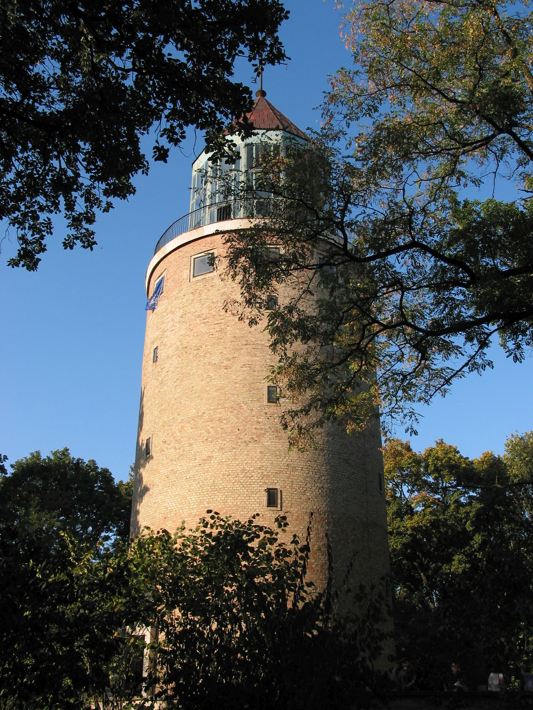 A Gödöllői Agrártudományi Egyetem víztornya (tervezte Jánossy György, épült 1955-59-ben)